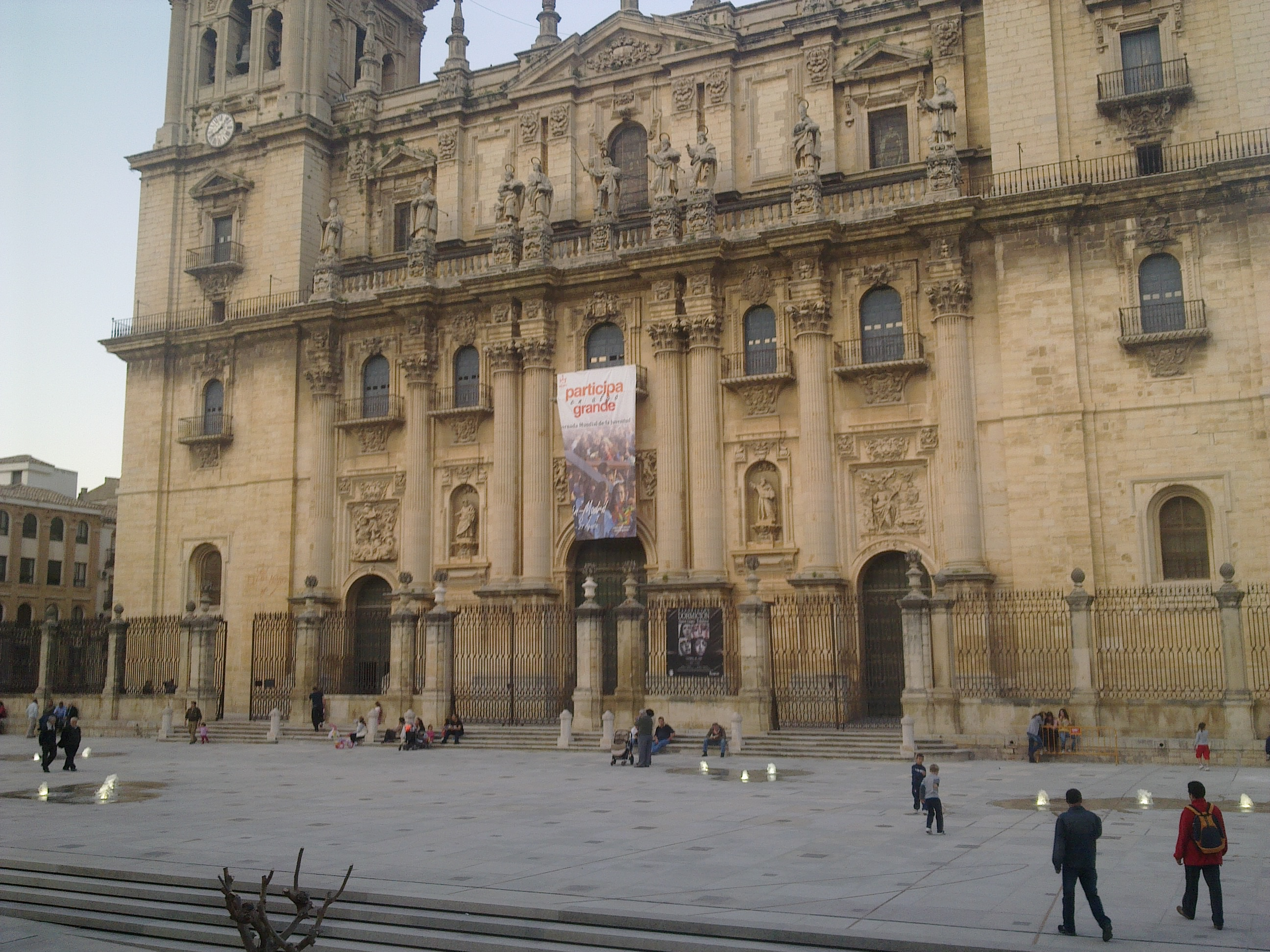 Nuevo aspecto de la Plaza de Santa María, en Jaén.